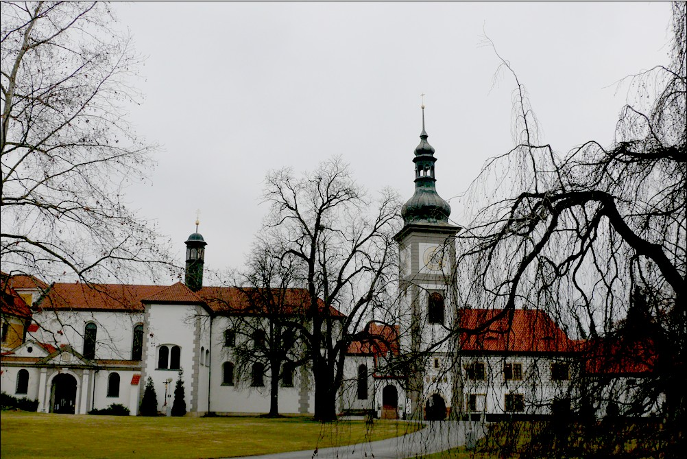 Česky: Kostel sv. jakuba